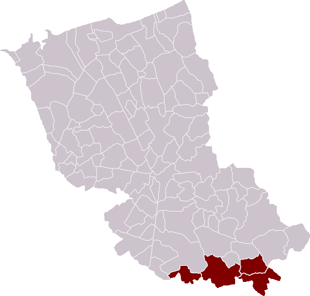 Communauté de communes Flandre Lys: Gedeeltelijk! Locatie in arrondissement Duinkerke. Zelfgemaakt. Partially! Location in the arrondissement of Dunkirk. Self made. Partiellement! Localisation dans l'arrondissement de Dunkerque. Fait moi-même.